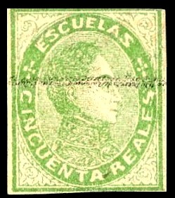 Estampilla venezolana de 1871 con perfil de Simón Bolívar seri escuelas